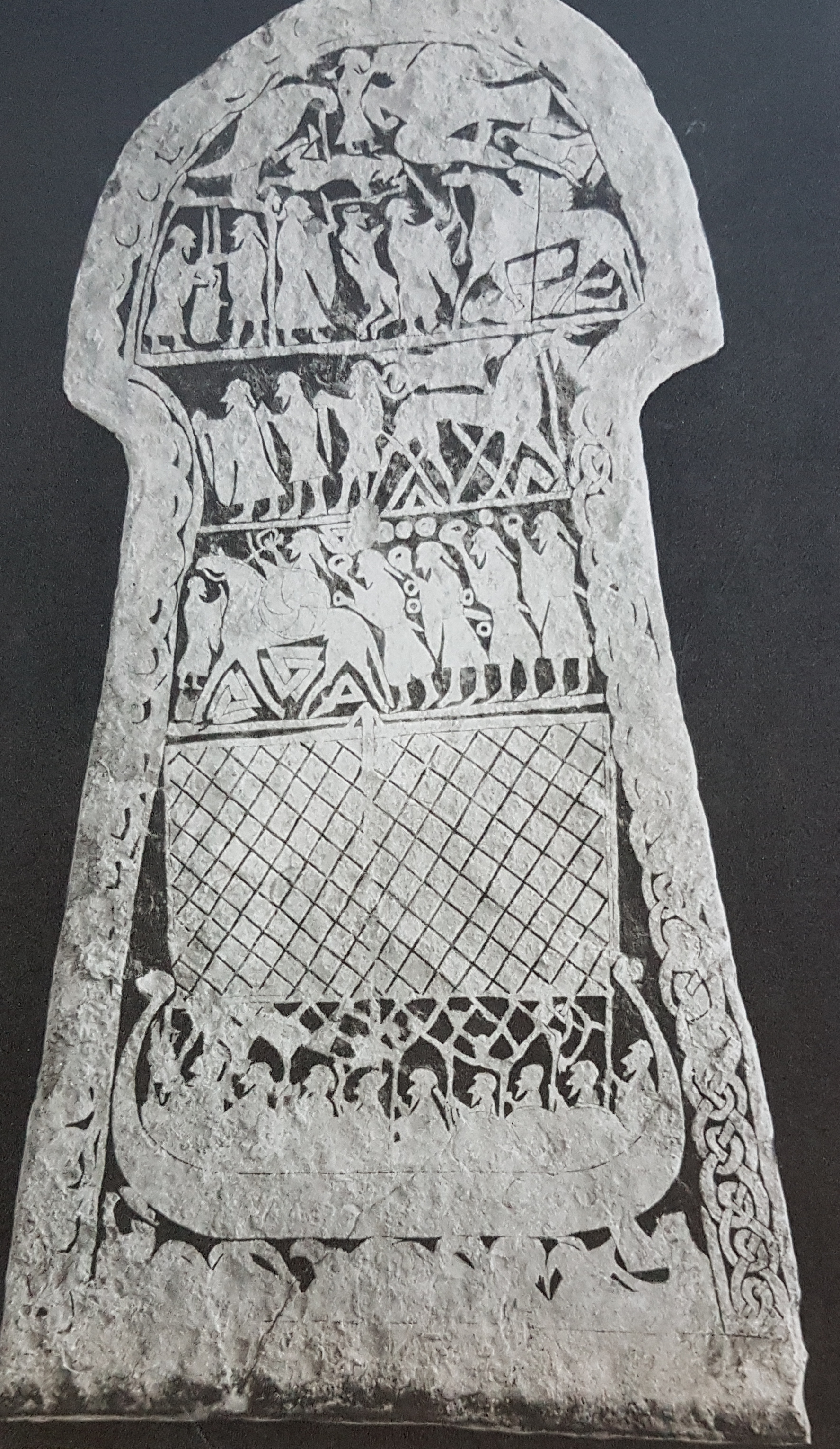 Bildsten skapad av Lärbrostenarnas mästare omkring 700 ef. Bildspelen kommer från Tängelgårda i Lärbro socken på Gotland. Den är skapad omkring 700 efter kristus och förvaras numera vid Statens historiska museum. Avfotograferad bild från Allhems Svenskt konstnärslexikon.